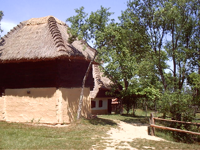 Őrségi tájházak a pityerszeri skanzenben